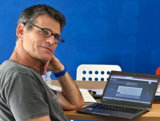 יפתח אלוני